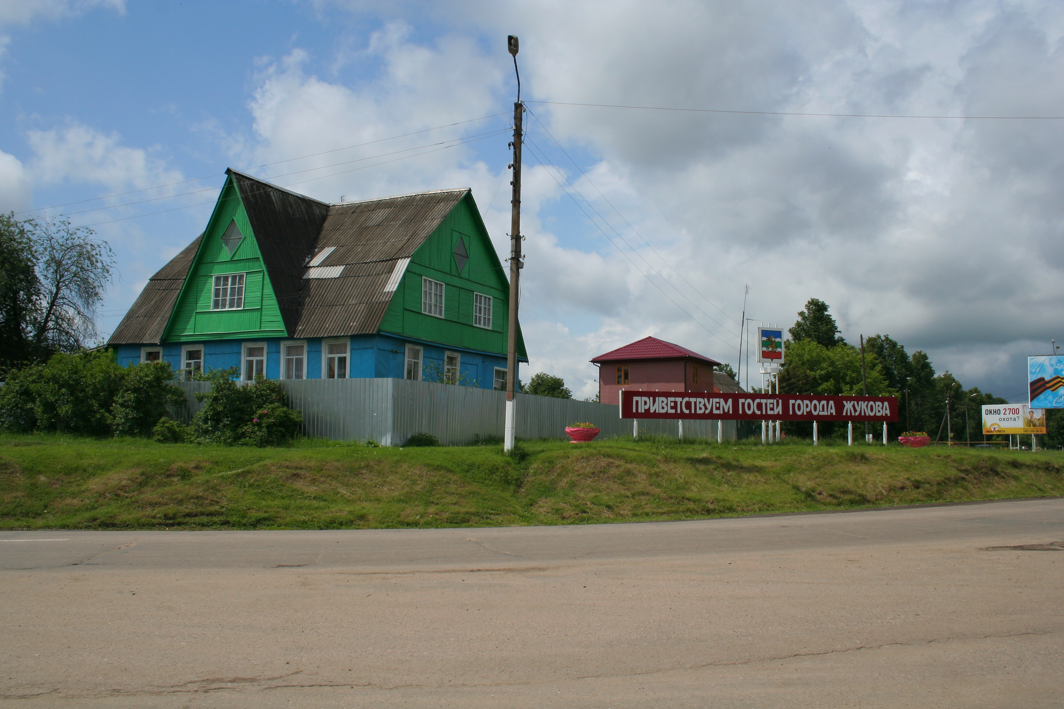 Stadt Schukow, Oblast Kaluga, Russland. Stadteinfahrt.